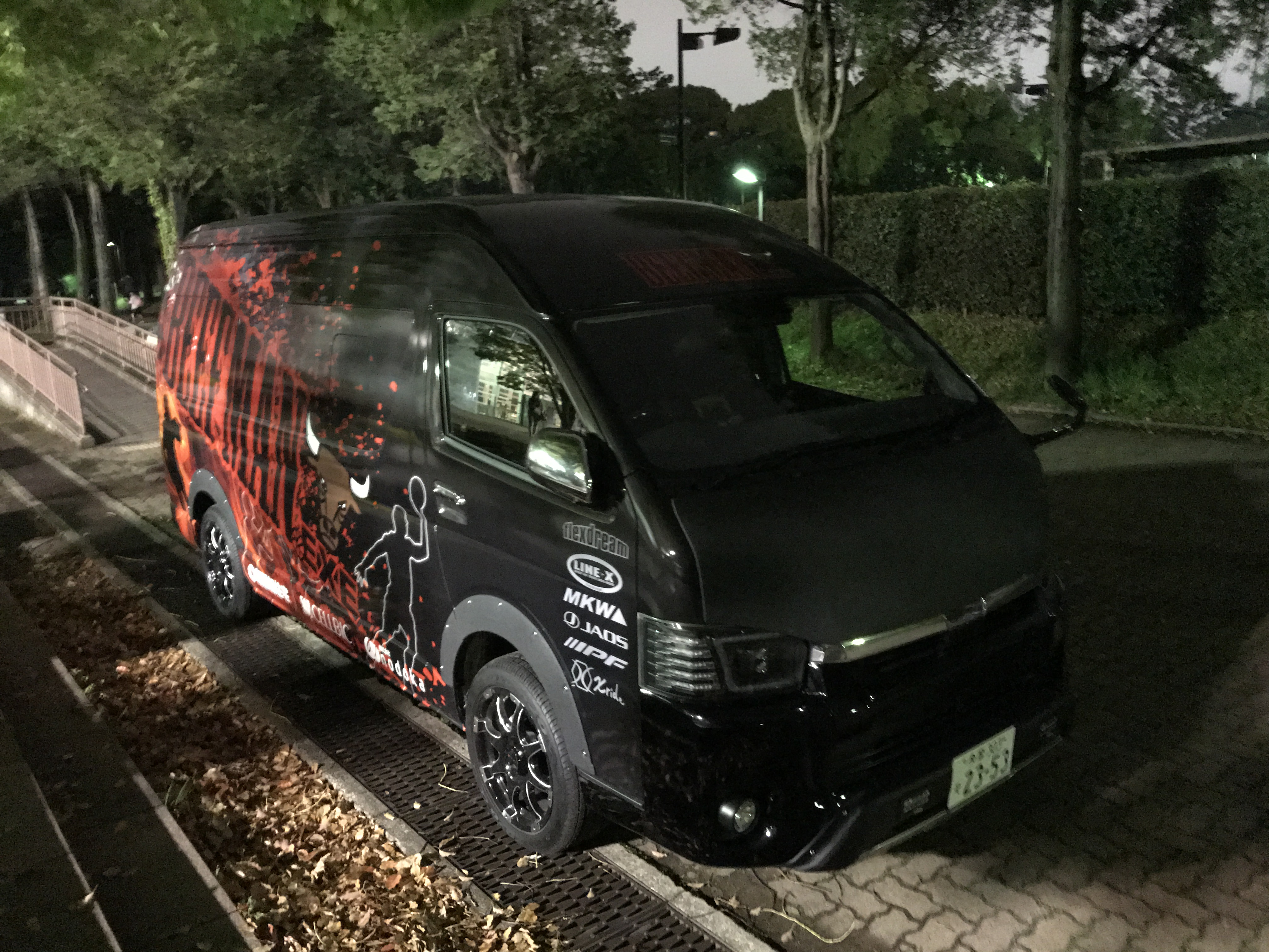 BEEFMAN.EXE サポートカー